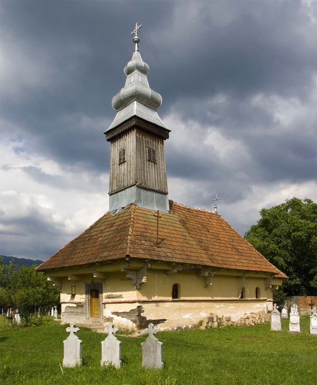 Biserica de lemn din Cociuba Mică. Vedere dinspre sud-vest.